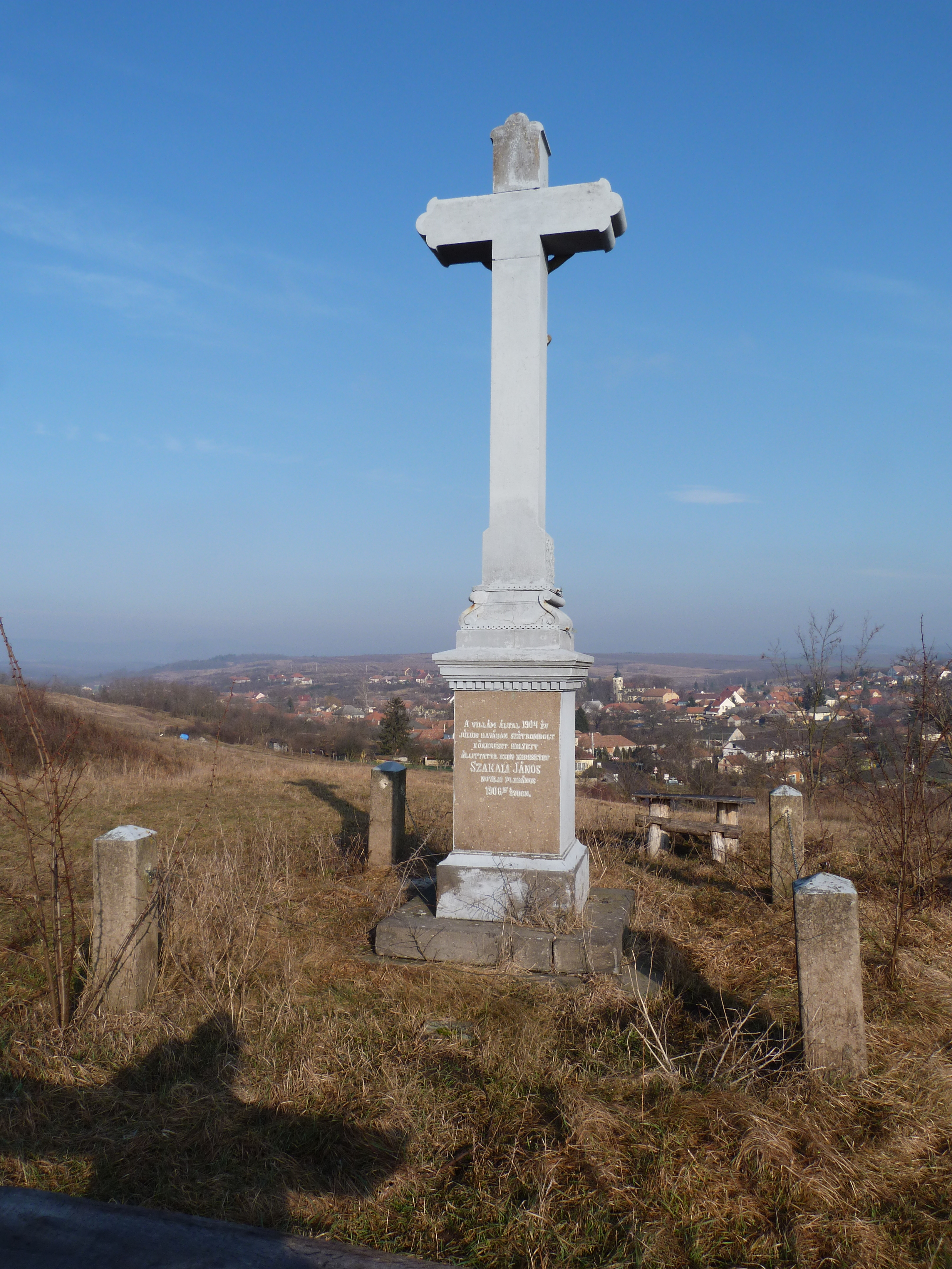 A felvétel 2015. január 14-én szerdán készült Novajon. A Novaj feletti kőkeresztet, amit a villám 1904 július havában lerombolt, 1906-ban Szakali János novaji plébános állíttatta helyre. ©© Derzsi Elekes Andor, Budapest, 2015 Published in the Metapolisz DVD line. You are authorised to use this vid under Creative Commons – even for commercial, for profit purposes. The vid must be attributed to Derzsi Elekes Andor. All of the photos and vids in the Metapolisz DVD line are under Creative Commons and can be used even for commercial – for profit – purposes. Recommended Citation Derzsi Elekes Andor: Metapolisz DVD line